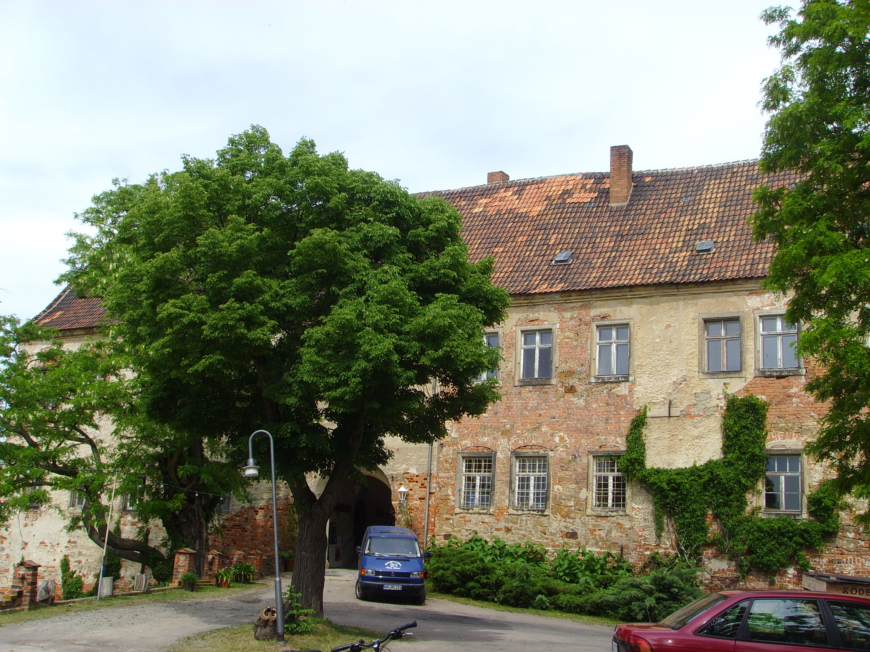 Burg Klöden in Klöden, Ortsteil der Stadt Jessen (Elster)